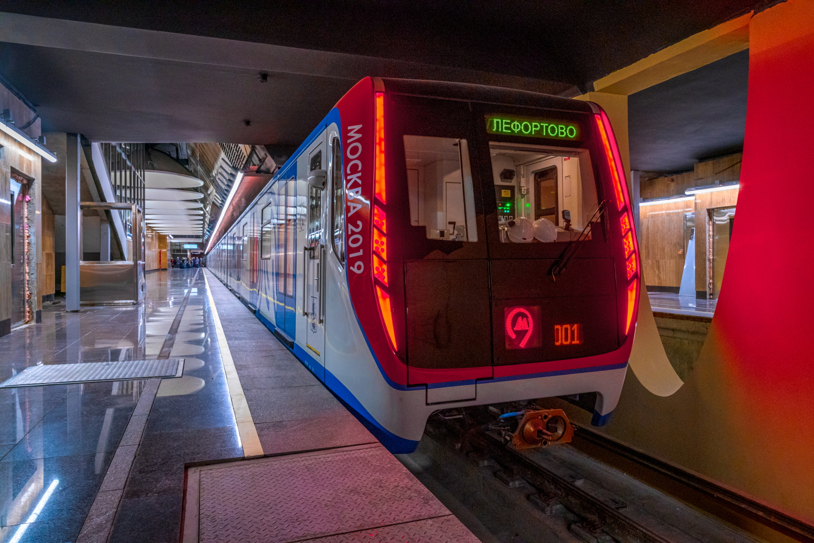 Станция Юго-Восточная Московского метрополитена в январе 2020 года. Электропоезд 81-765 Москва на фоне платформы